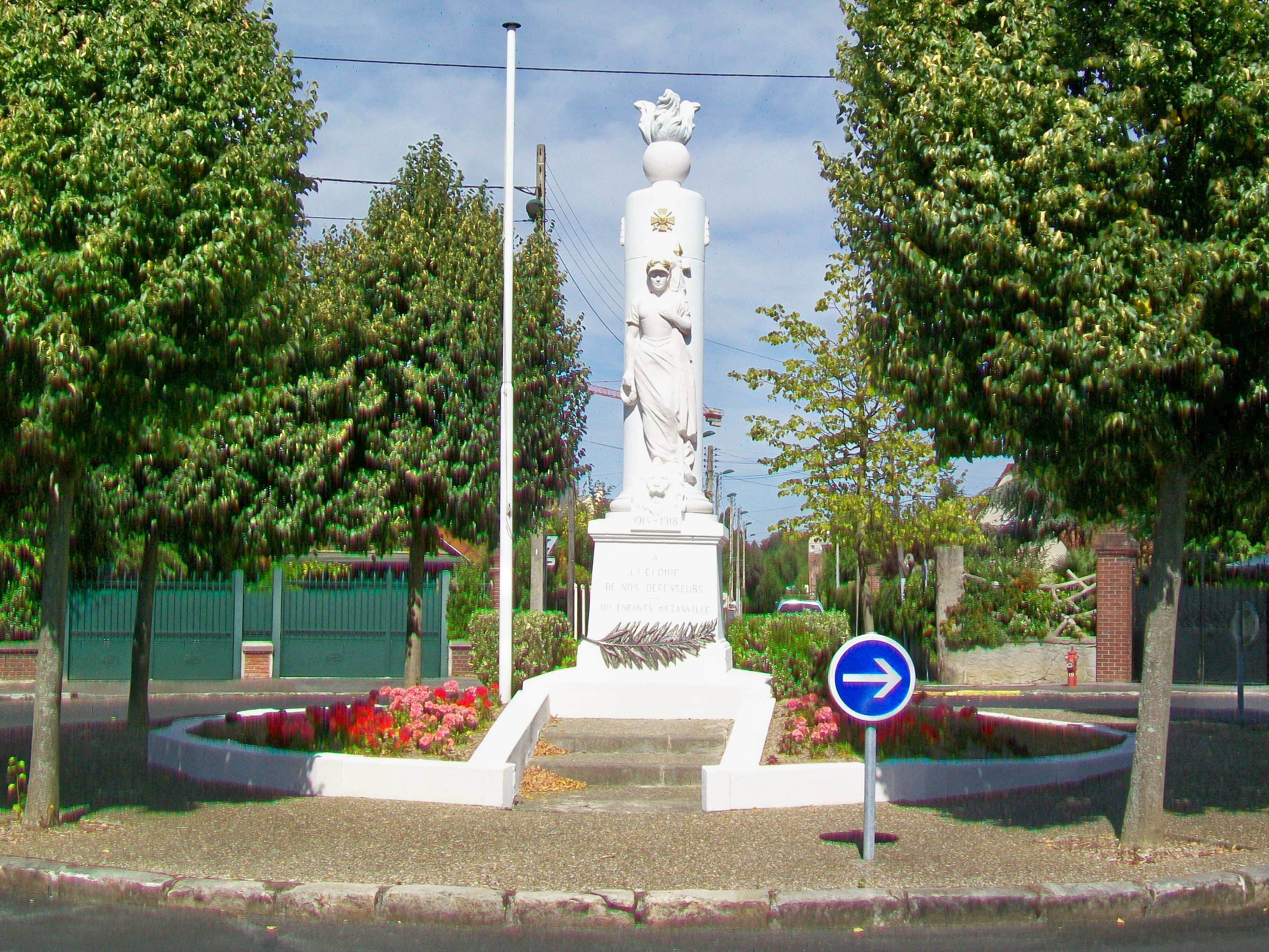 Le monument aux Victoires (monument aux morts), place de la République.